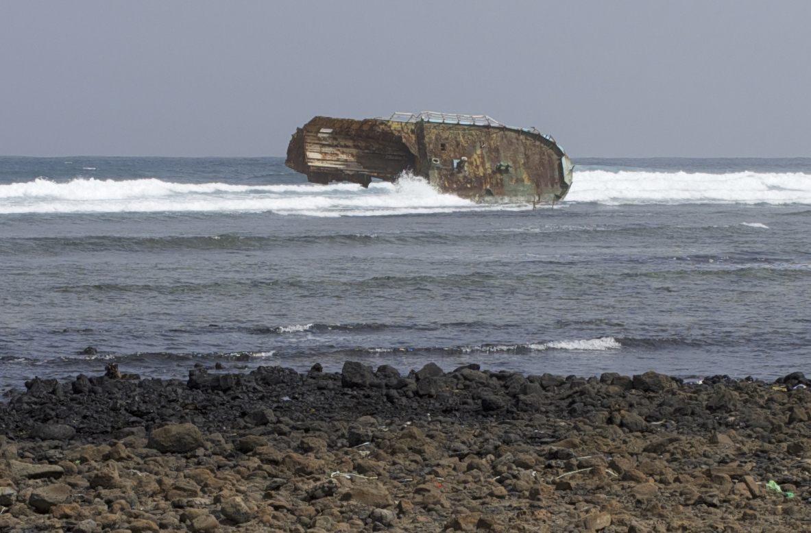 An der Ostküste der kapverdischen Insel liegendes Wrack eines spanischen Fischereischiffes. Laut Angaben von Einwohnern liege es dort seit 7 Jahren. Lichter des Flughafens seien für einen Leuchtturm gehalten worden, daher sei des zu einem Navigationsfehler gekommen. Es sollen alle Seeleute überlebt haben.